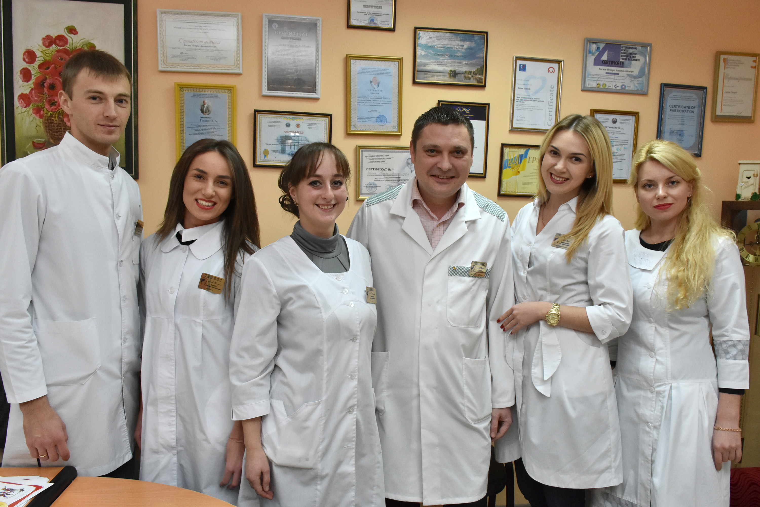 Колектив кафедри ортопедичної стоматології стоматологічного факультету ТДМУ. Аспірант Володимир Радчук, магістрант Оксана Лаврін, асистент Анна Воробець, завідувач кафедри Петро Гасюк, старший лаборант Ірина Боднарчук і доцент Ольга Стаханська.